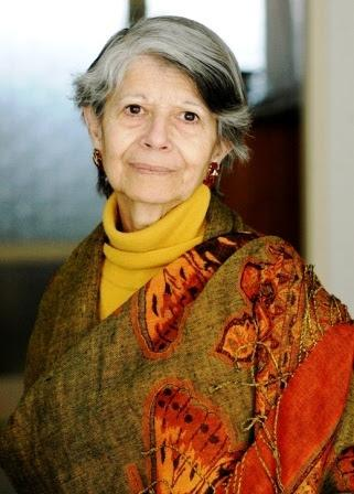 רות בלומרט צילום: מוטי קיקיון